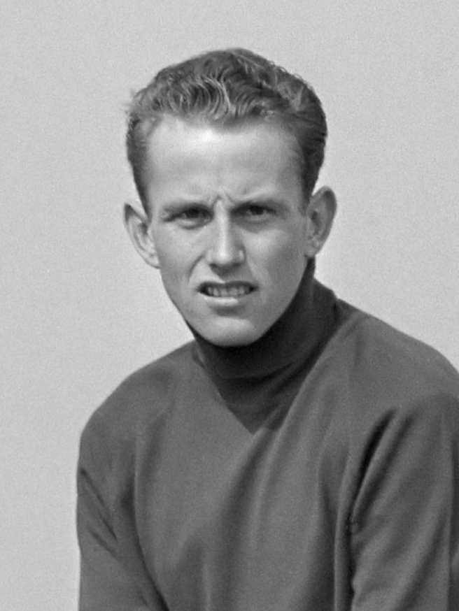 Wereldkampioenschappen paalzitten in Roelofarendsveen, Joop Zoetemelk op paal 6 augustus 1971